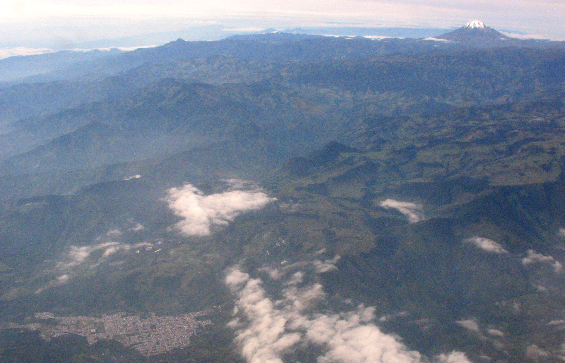 Vista aerea de la ciudad de Libano (Tolima), Colombia, con el Nevado del Tolima al fondo.